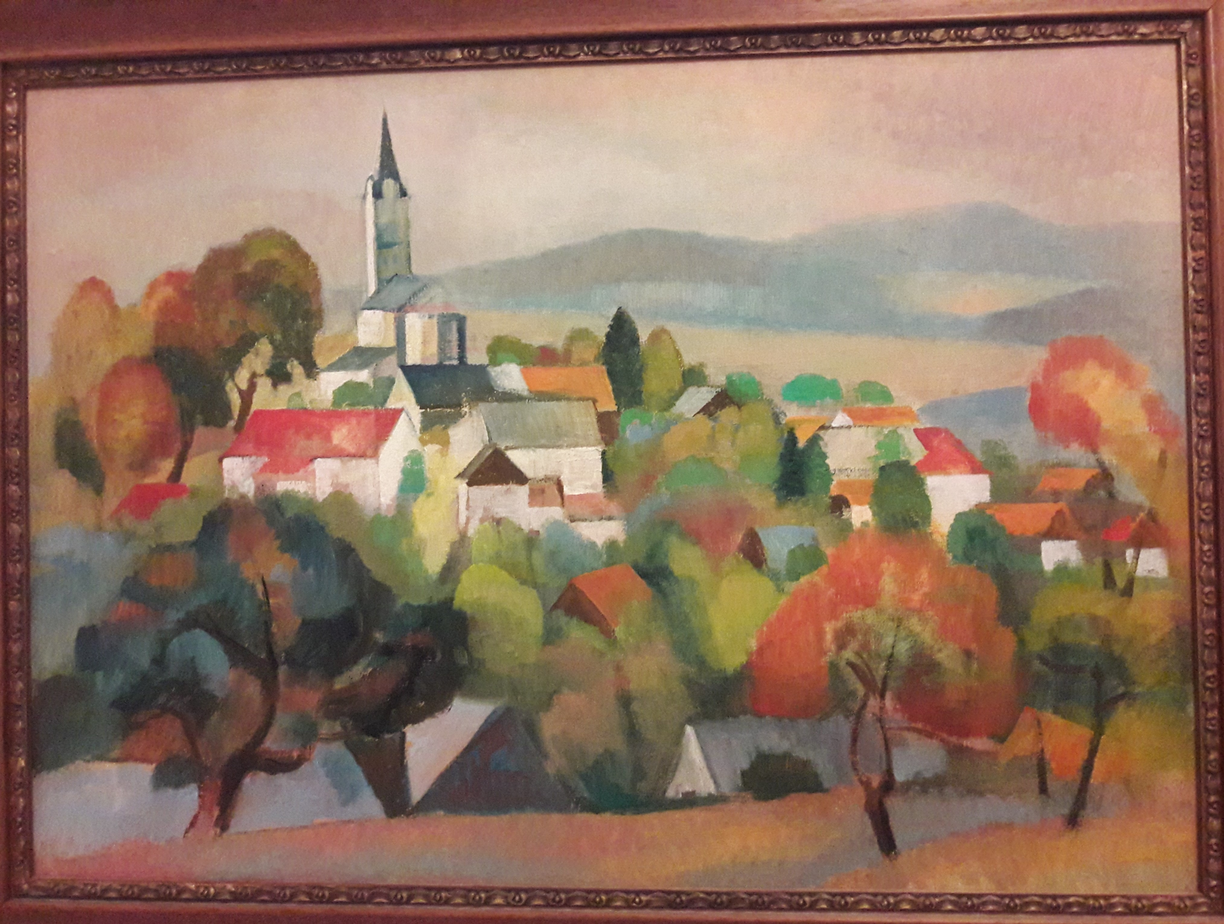 obraz Přemysl Vanke